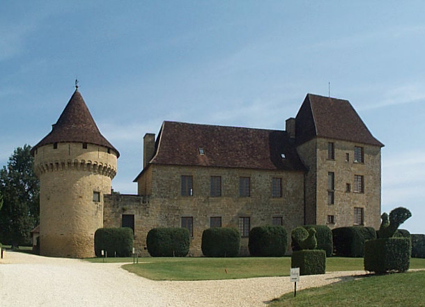 Château de Chabans,Saint-Léon-sur-Vézère, Frankreich. Object location 45° 0′ 47.40″ N, 1° 3′ 38.70″ E This and other images at their locations on: Google Maps - Google Earth - OpenStreetMap - Proximityrama(Info) This edifice is inscrit Monument Historique.